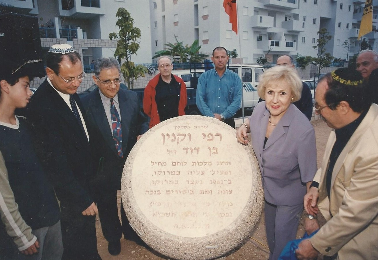 טכס בשכונת נווה אילן באשקלון, קריאת גן על שמו של רפי וקנין